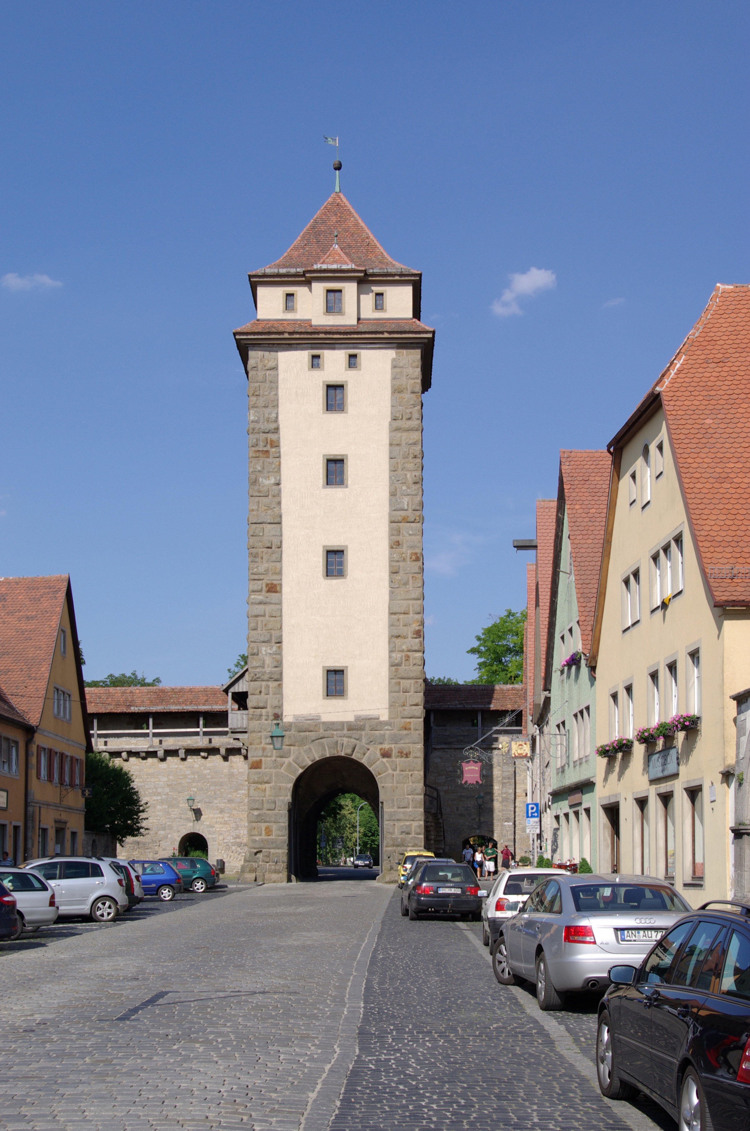 Rothenburg ob der Tauber, Galgentor (Würzburger Tor)